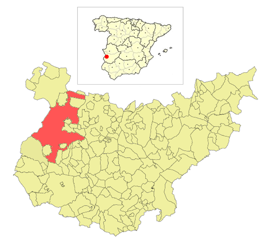 Localización de Badajoz en España y en su provincia